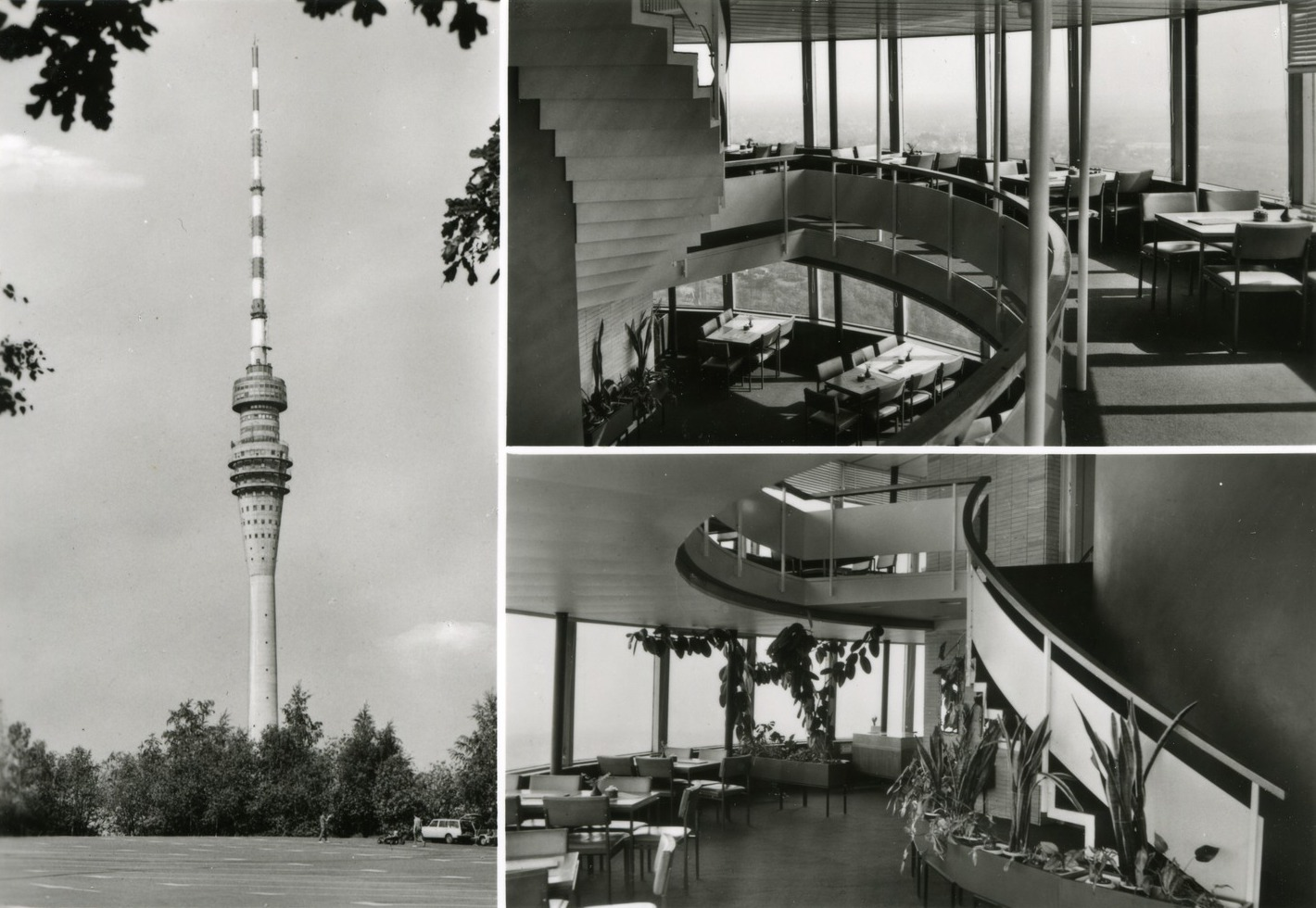 Dresden; Fernsehturm - Turmcafe This postcard is from publisher Brück & Sohn in Meißen ( postcard has a unique number 30518 and is available in a higher resolution at the publisher. This images was uploaded in a cooperation project between Wikipedians and the publisher.